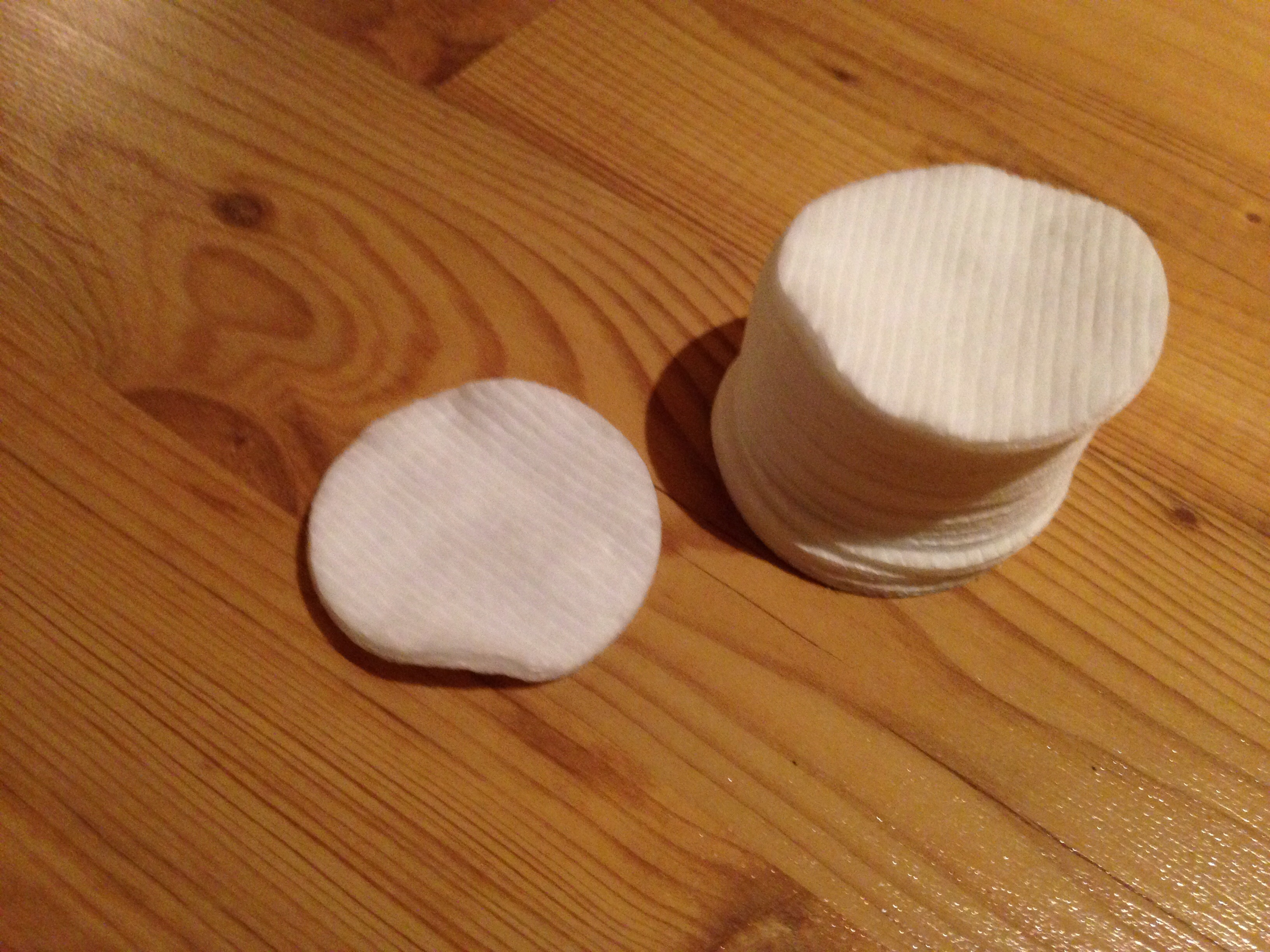 Watte Pad